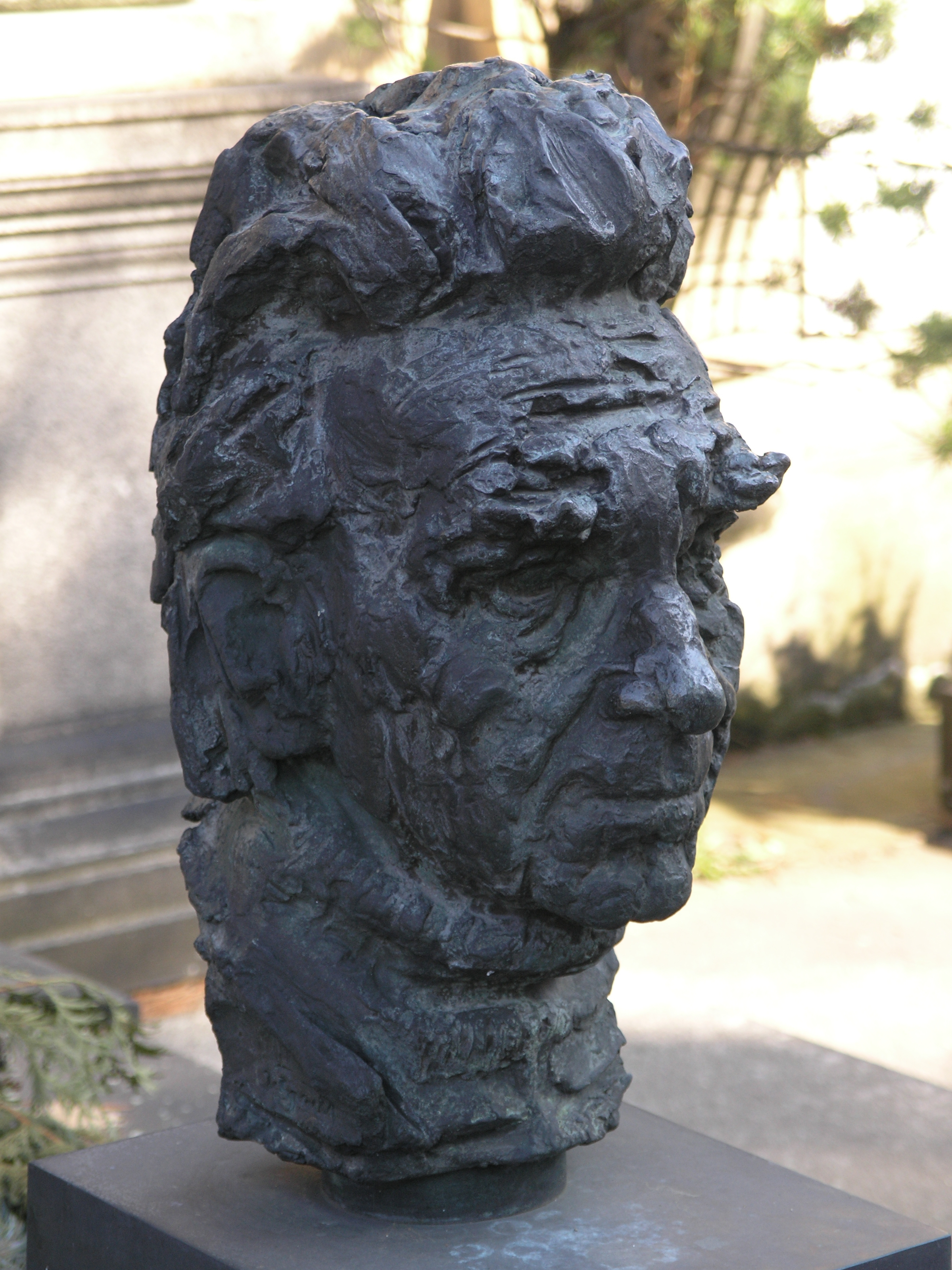 Vyšehradský hřbitov – Willi Nowak (též Vilém Nowak, 1886–1977), malíř a grafik.